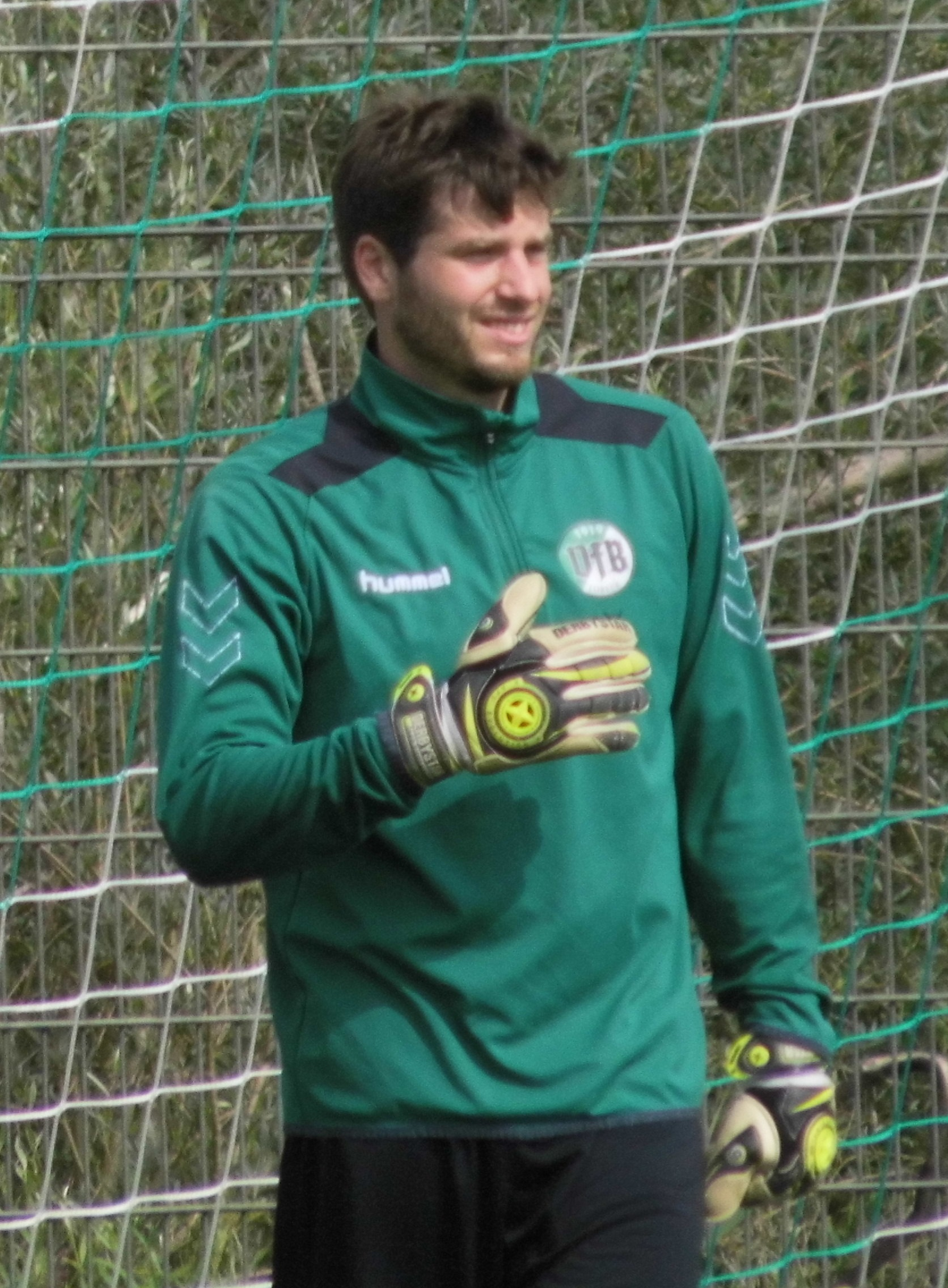 Jonas Toboll, Torwart beim VfB Lübeck.